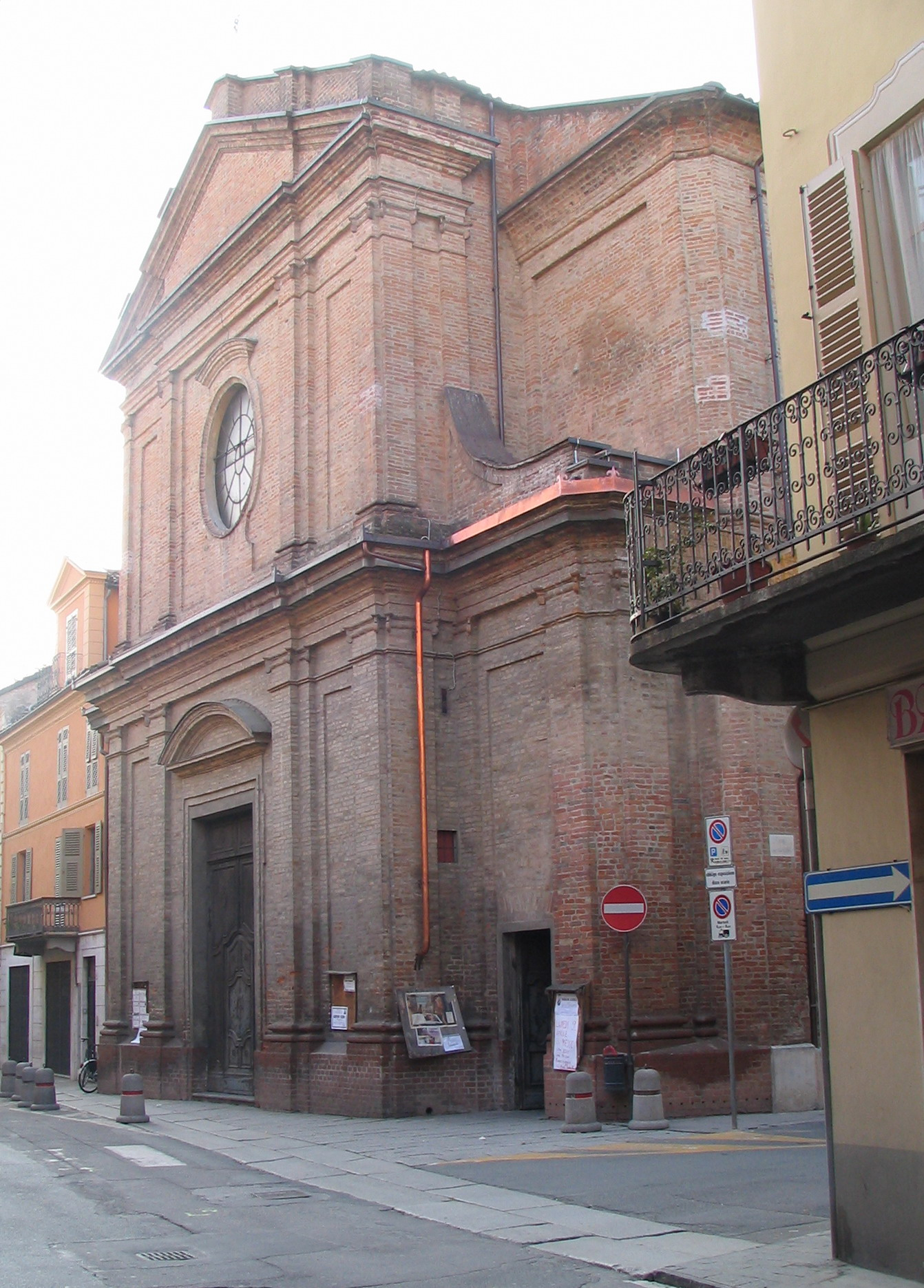 Nizza Monferrato (Asti), San Siro church